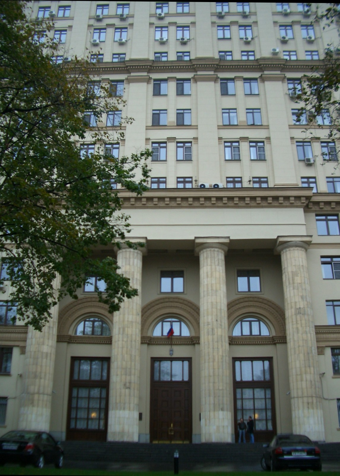 Beschreibung: Gebäude der russischen Föderalen Agentur für Atomenergie (Moskau, ul. Bol'schaja Ordynka 24/26) Здание Федерального агентства по атомной энергии (Москва, ул. Большая Ордынка 24/26) Autor: Lewa